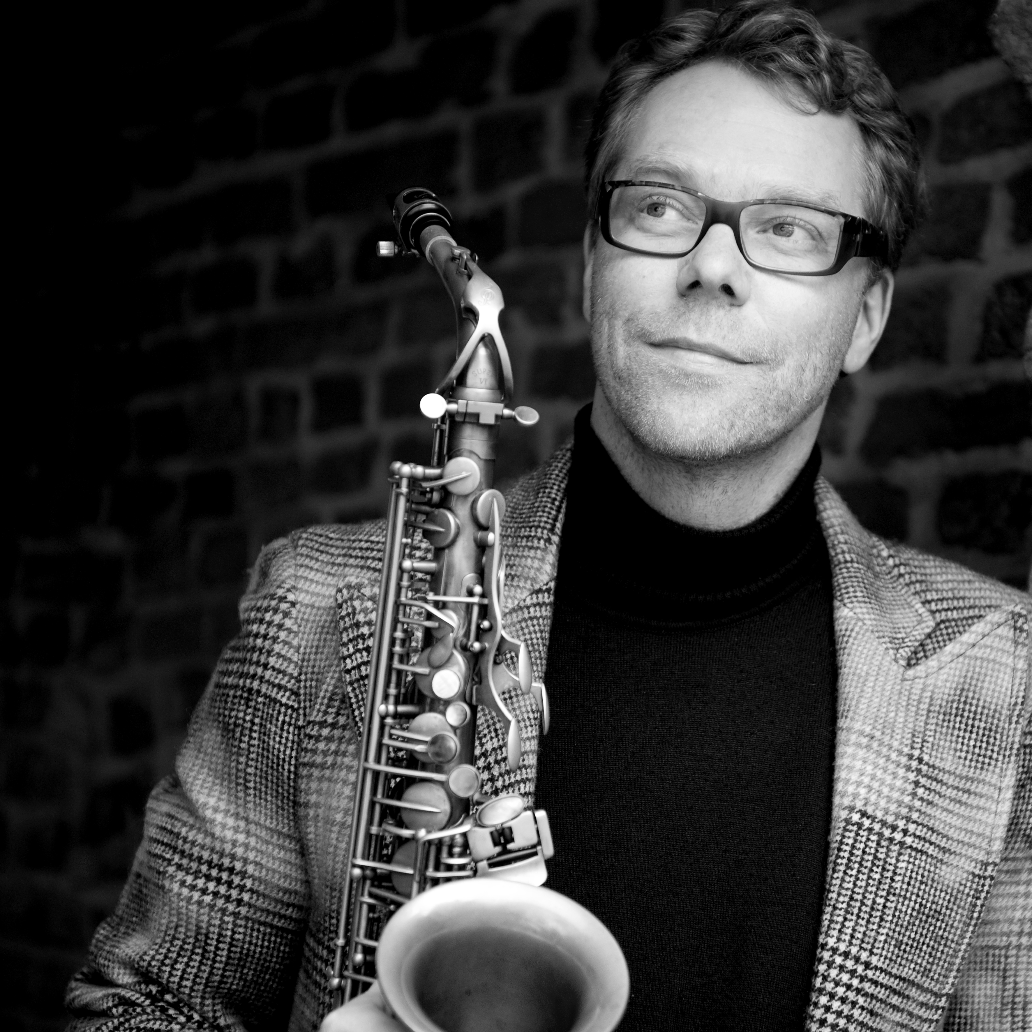 Reiner Witzel mit seinem Saxophon